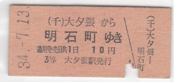 （千）大夕張と記された千年町駅発行の乗車券